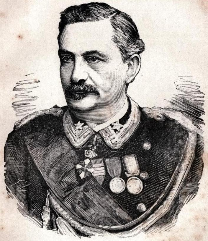 General, politician and defence minister of the Kingdom of Italy